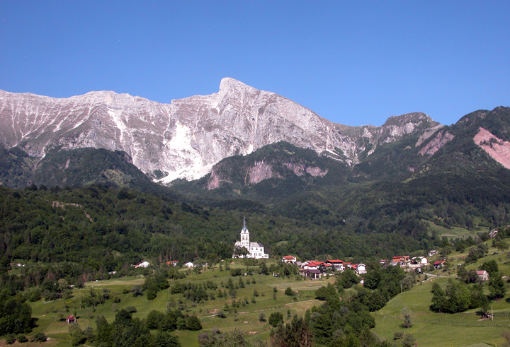 Drežnica & Krn